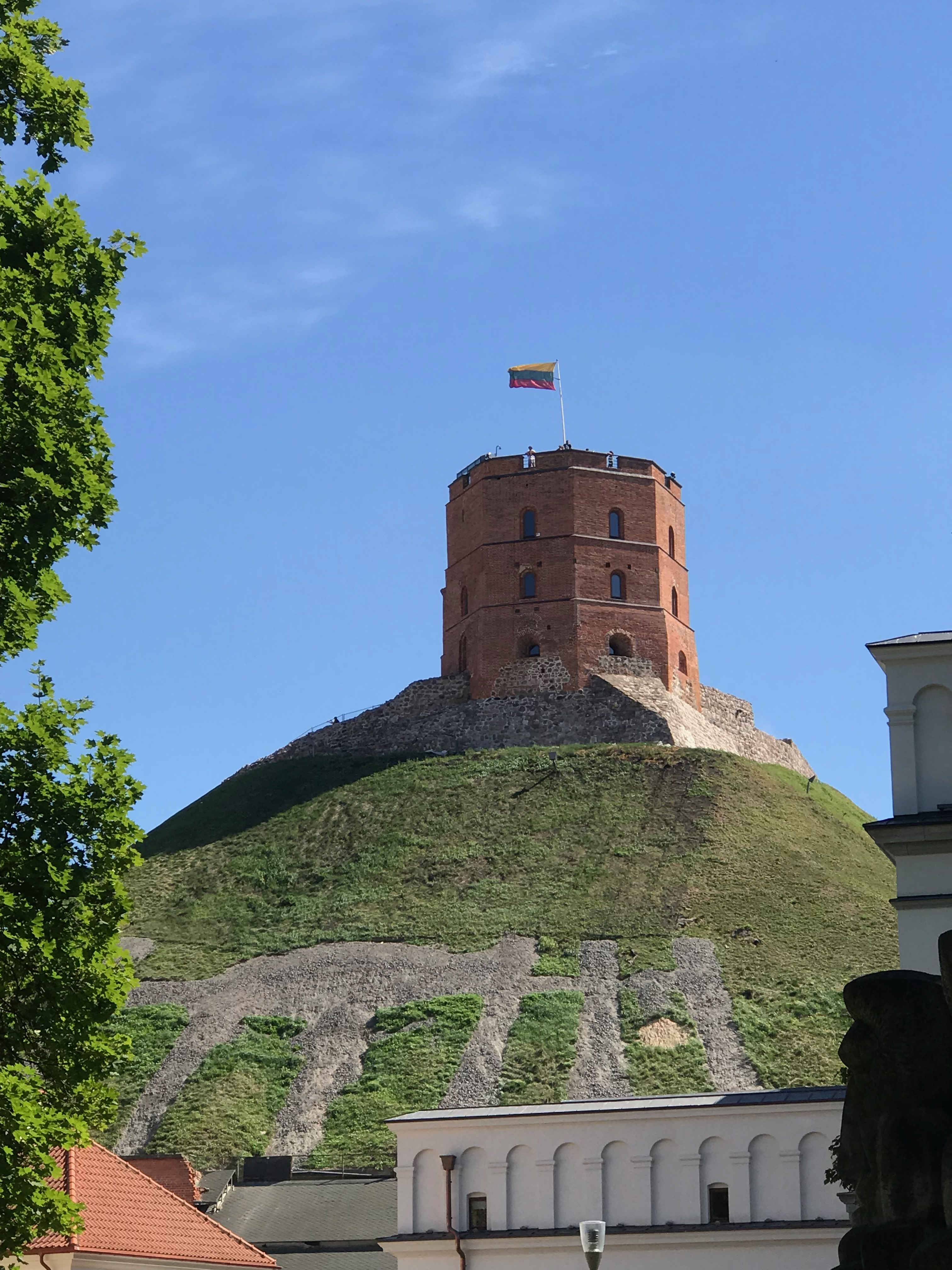 Вильнюс. Замковая гора и башня Гедиминаса